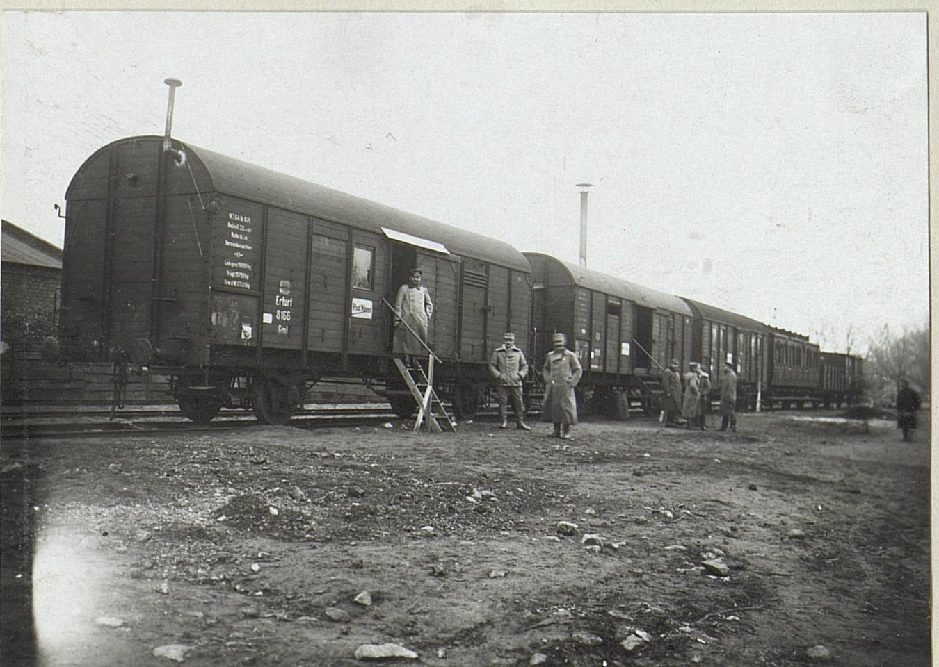 Krankenzug der Deutschen V.A.22 Kowel.